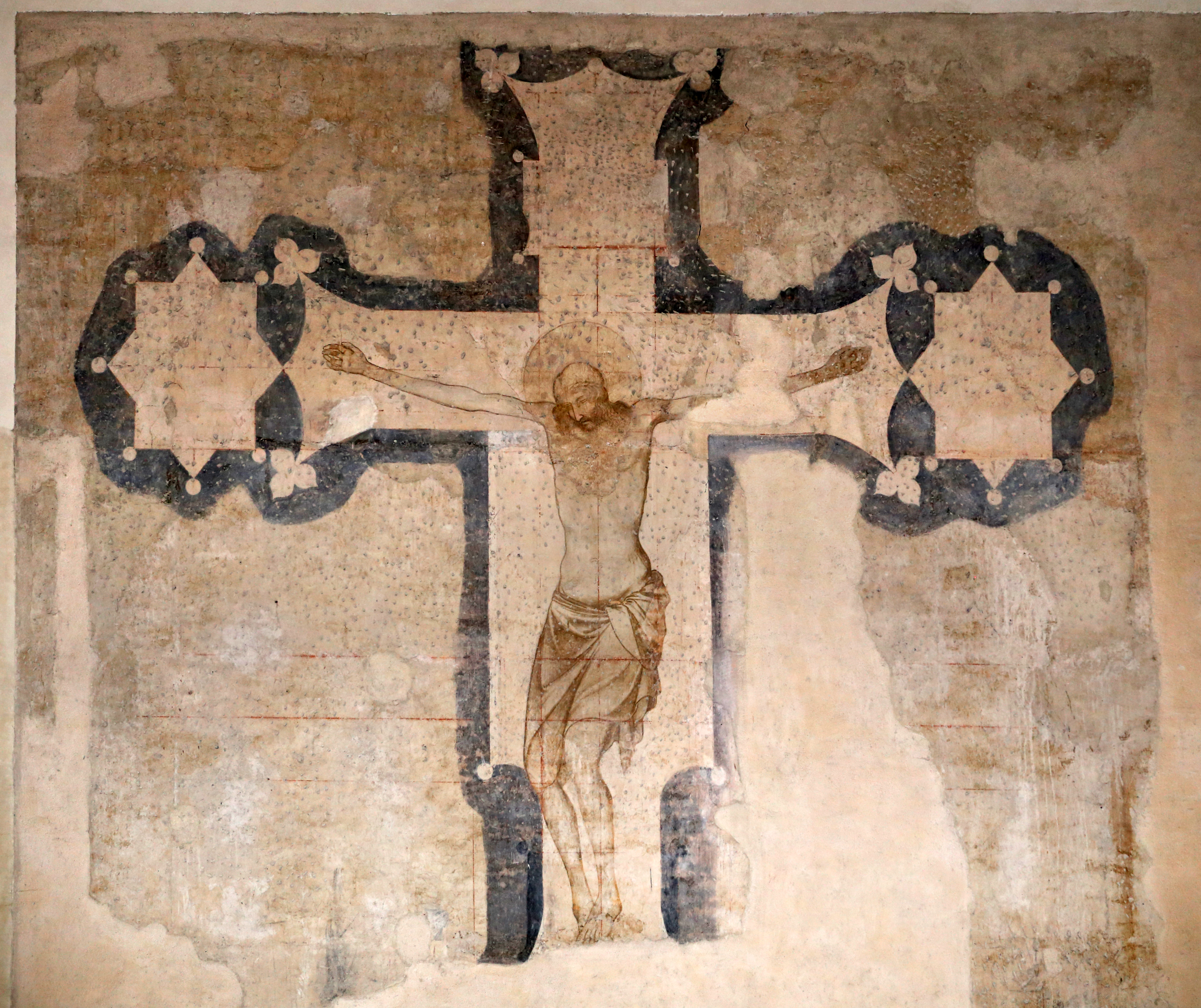 chiesa di San Francesco This is a photo of a monument which is part of cultural heritage of Italy.